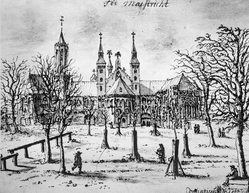 Sint-Servaaskerk: naar tekening van Valentijn Klotz, ca. 1660.